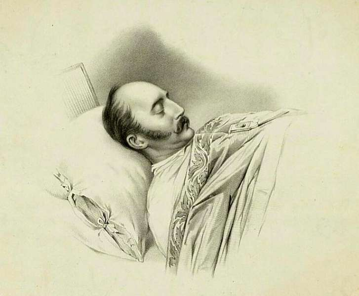 Император Николай I на смертном одре. Владимир Гау.